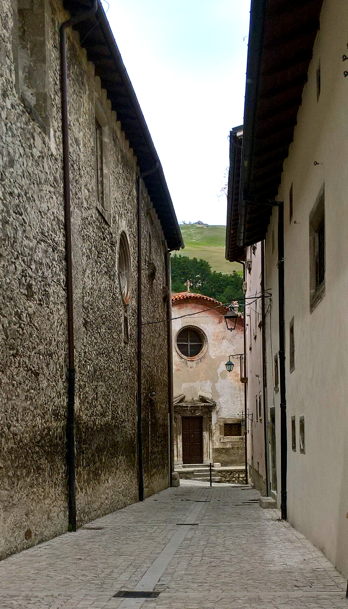 Oratorio del Suffragio dei Morti